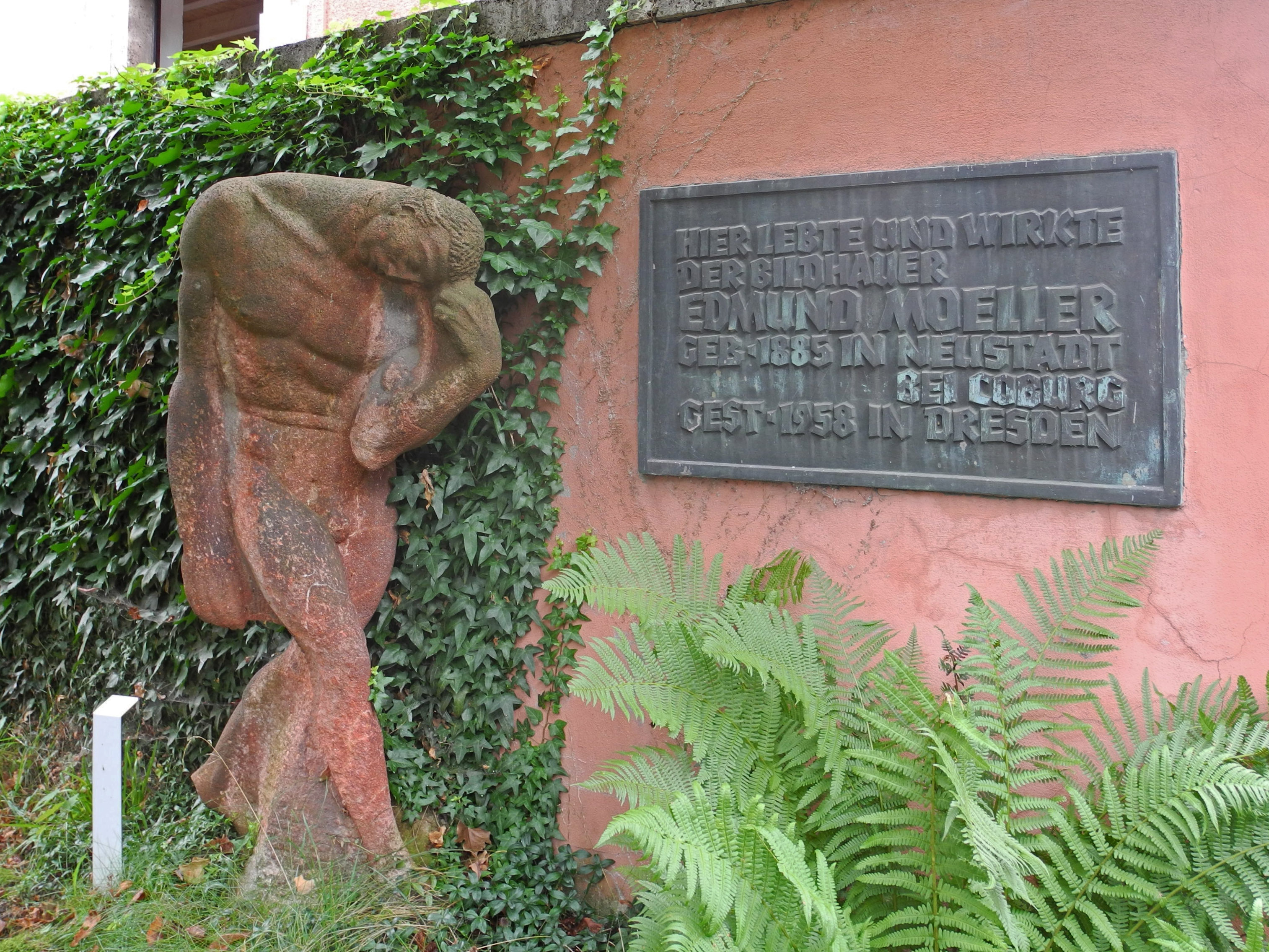 Tag des offenen Denkmals 2017 in Dresden – Skulpturengarten Edmund Moeller in Dresden-Mockritz